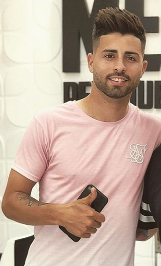 Imagen del futbolista Brian Martín